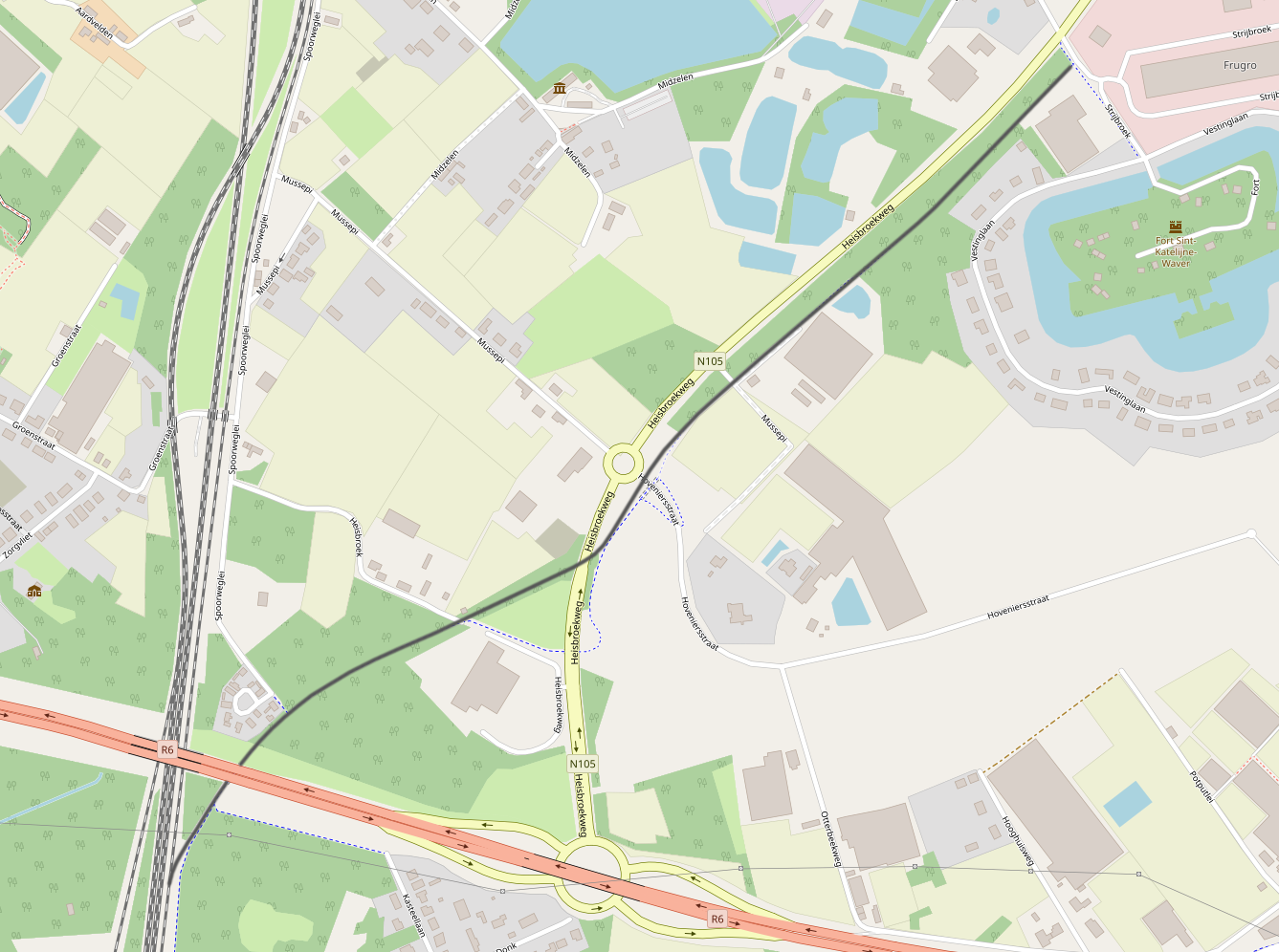 Belgian Railway Line 278, Y Heisbroeck - Sint-Katelijne-Waver Fort